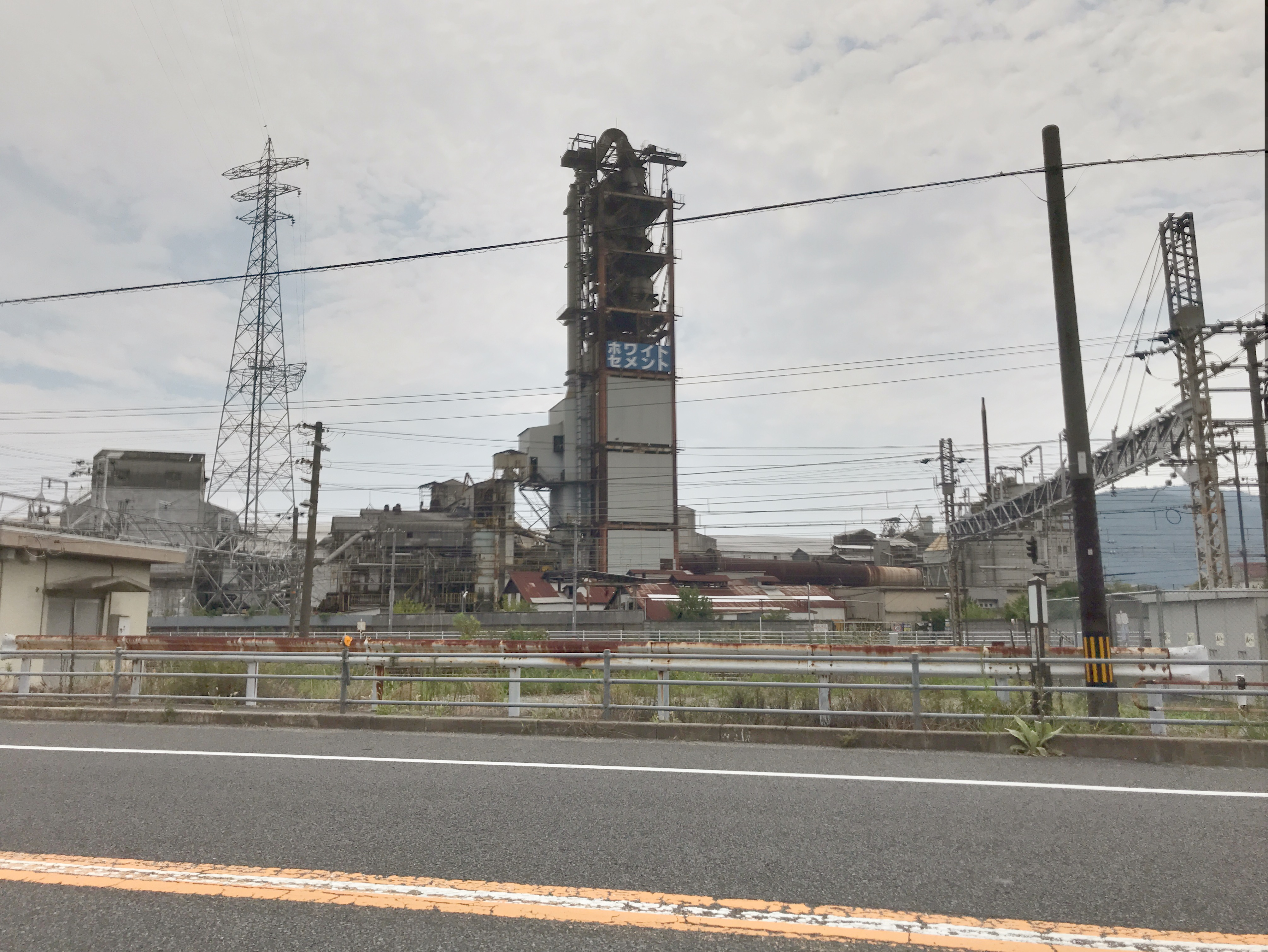 三原にあった山陽白色セメントの工場。閉鎖後の2019年8月の撮影。国道二号線より山陽本線を挟んで撮影。